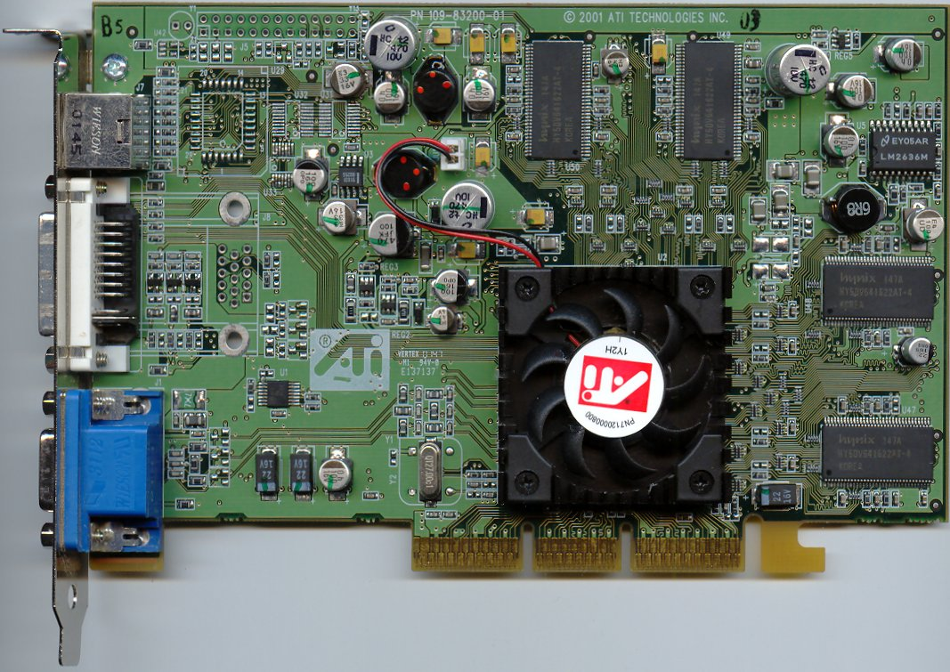 ATI Radeon 7500 AGP Video card